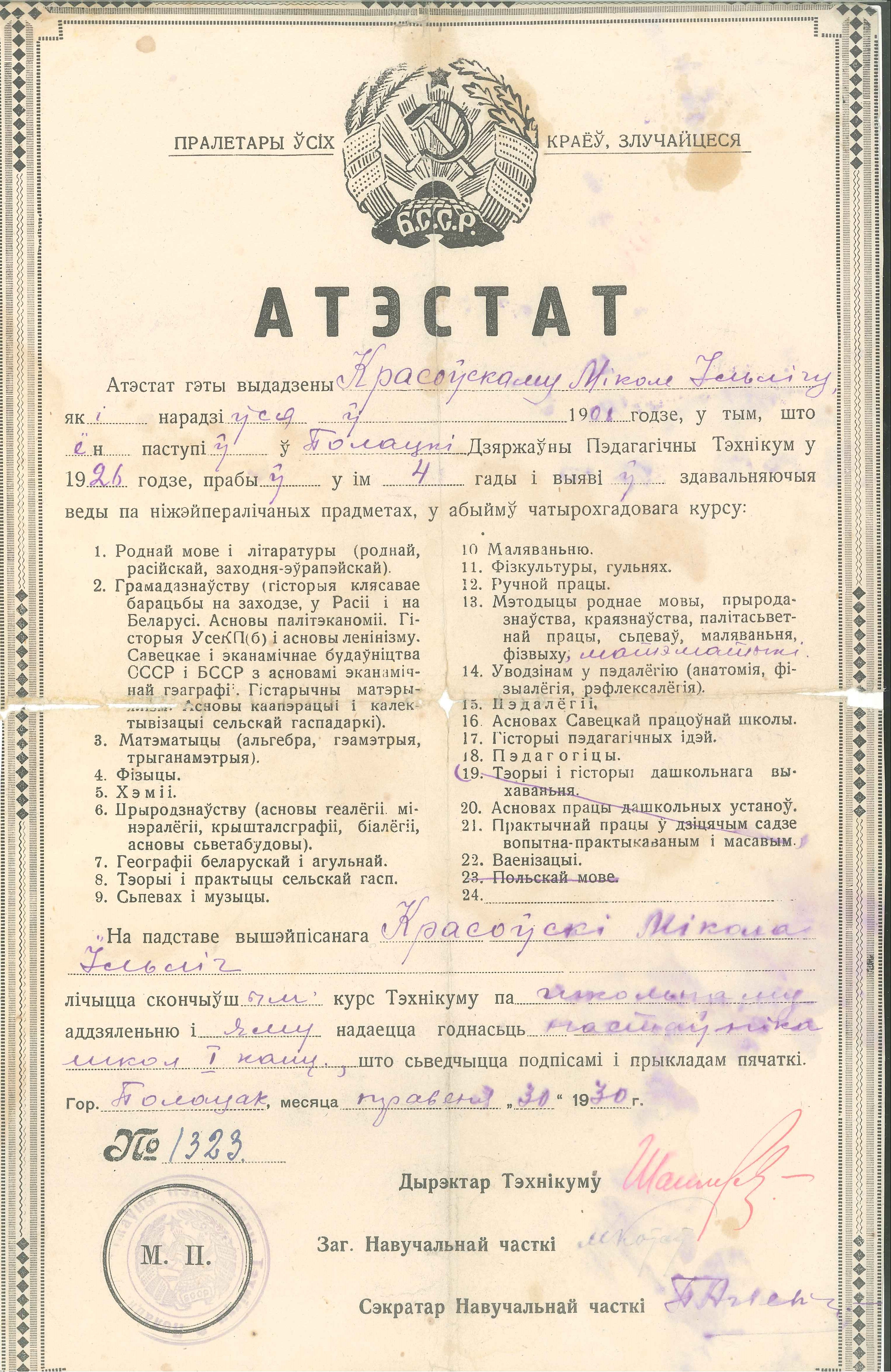 Атэстат Мікалая Красоўскага аб завяршэнні Полацкага педагагічнага тэхнікума ў 1930 годзе